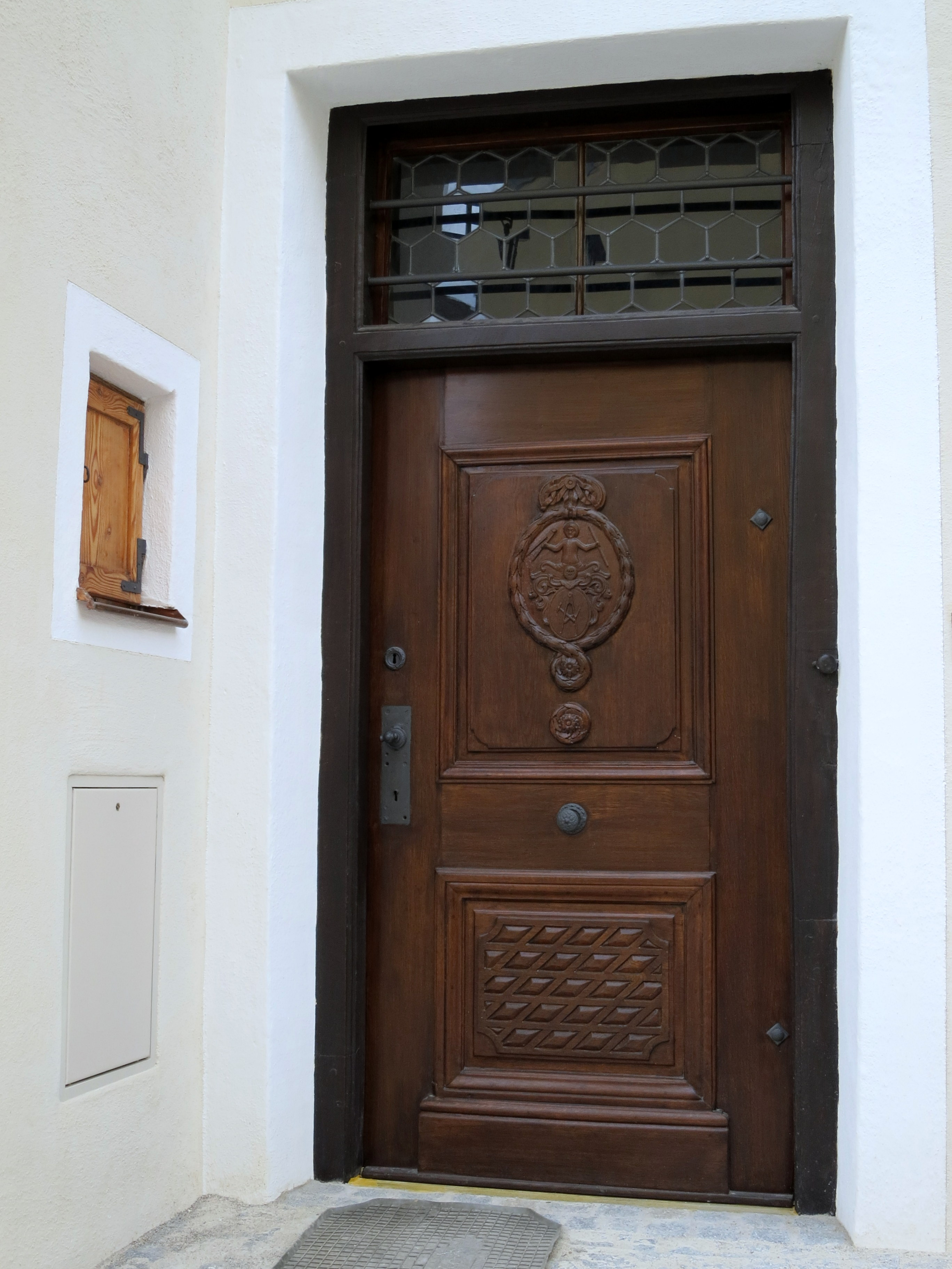 Die alte Haustür